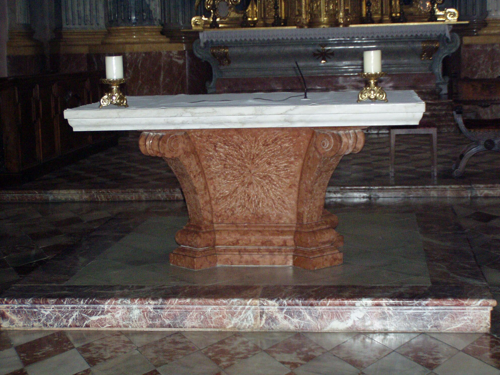 Dom zu Klagenfurt / Klagenfurt Cathedral: Volksaltar